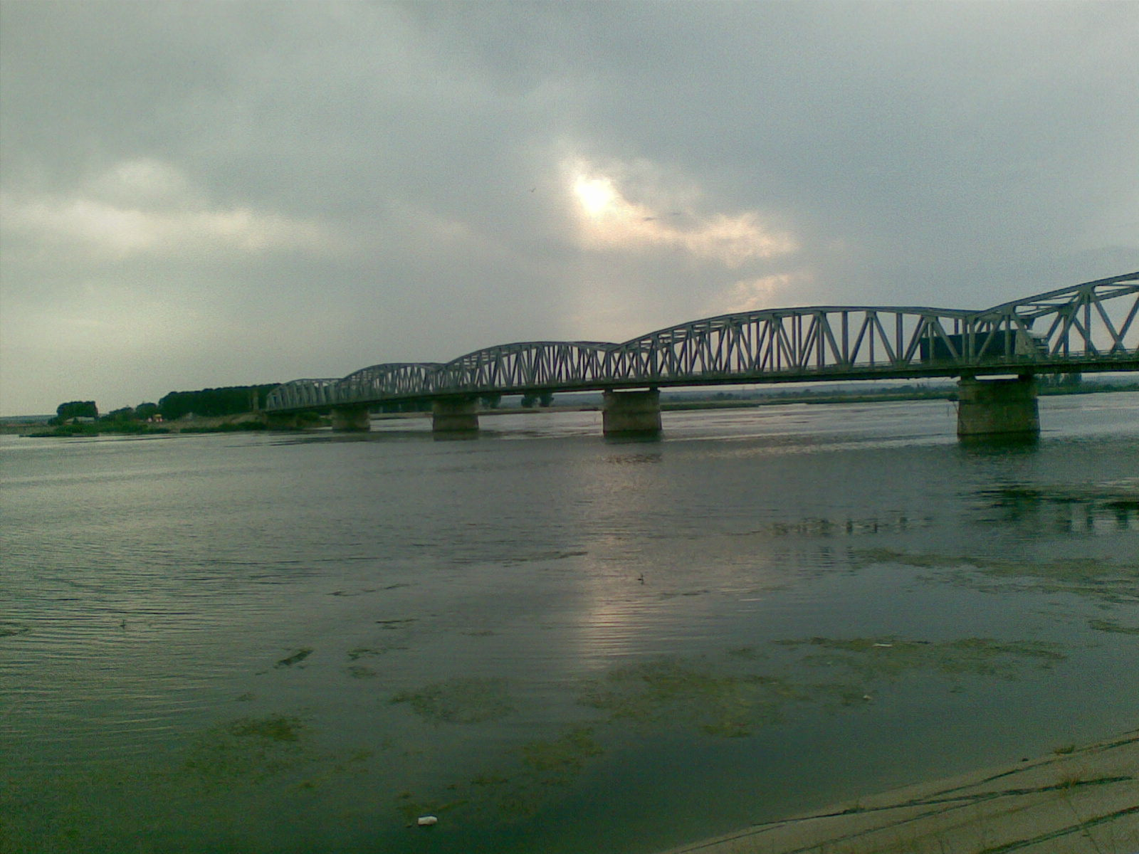 La ponto super la rivero Olt ĉe Slatina (RO).